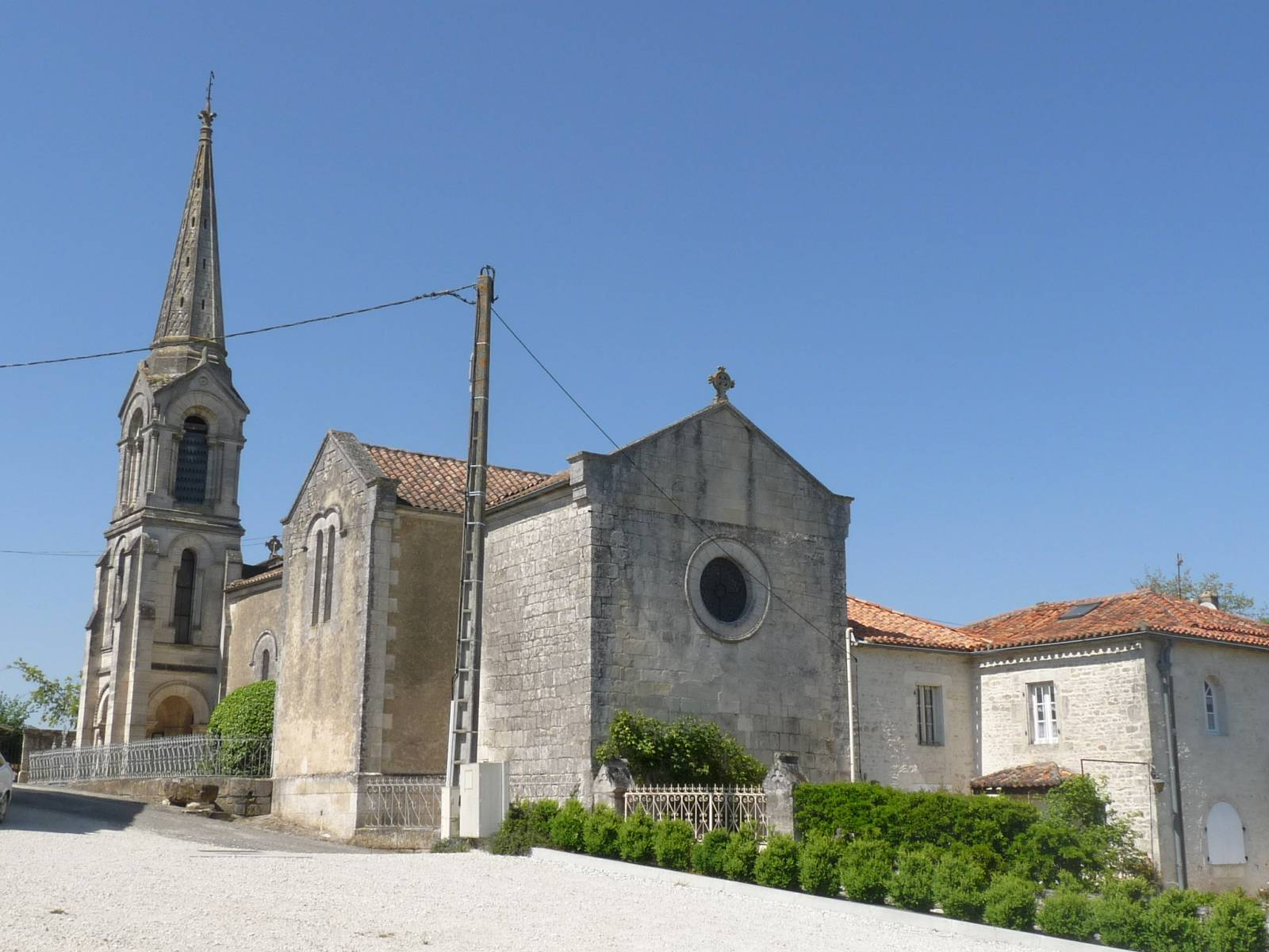 Eglise de Puyréaux, Charente, France